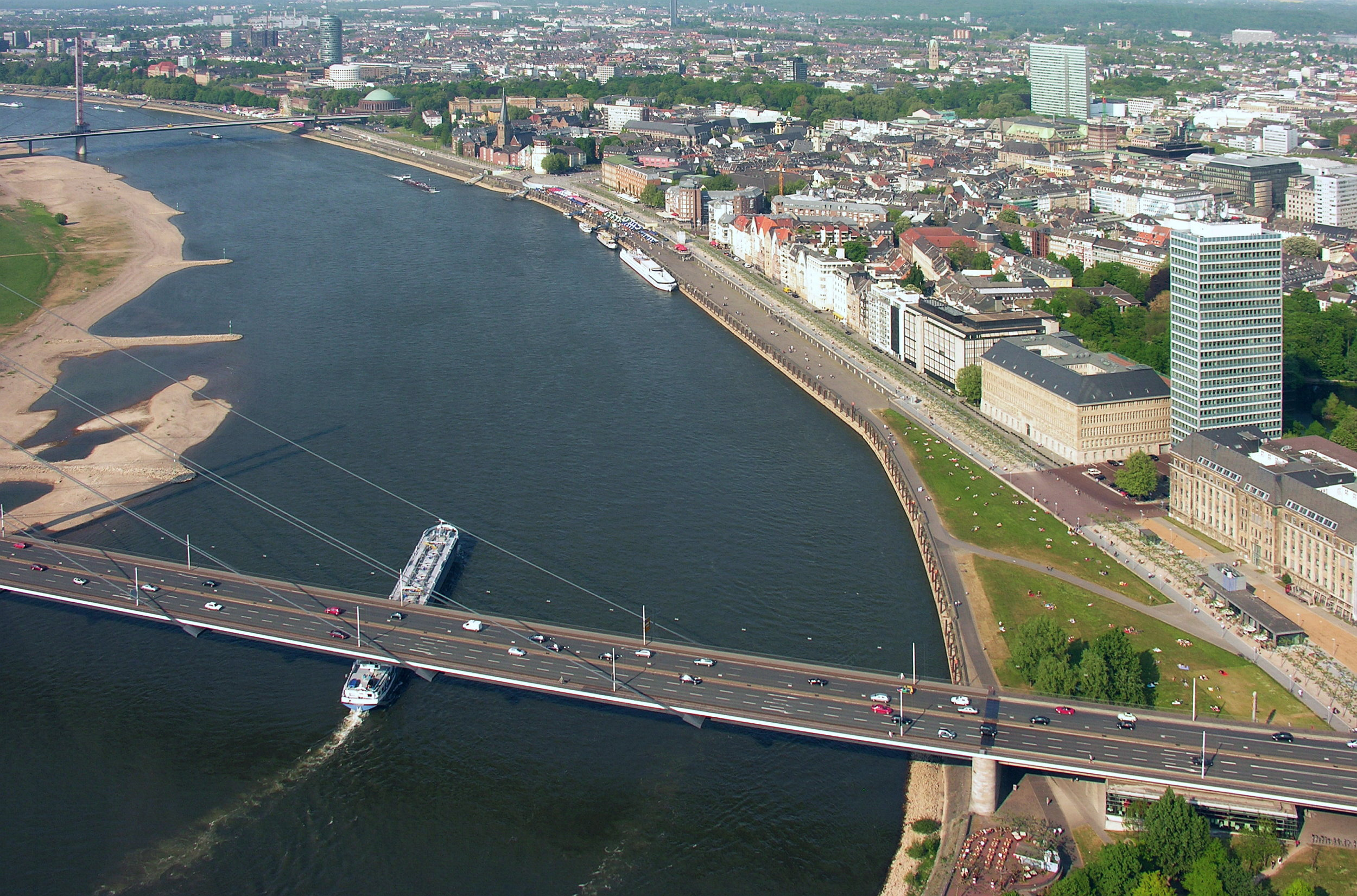 River Rhein Düsseldorf Bird's eye view - Rathausufer vor histor. Altstadt - Rheinufer NRW Wolfgang Pehlemann DSCN1026